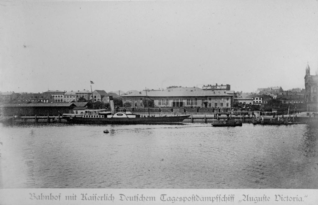 am Handelshafen, davor der Postdampfer AUGUSTE VICTORIA der Reederei Sartori & Berger.